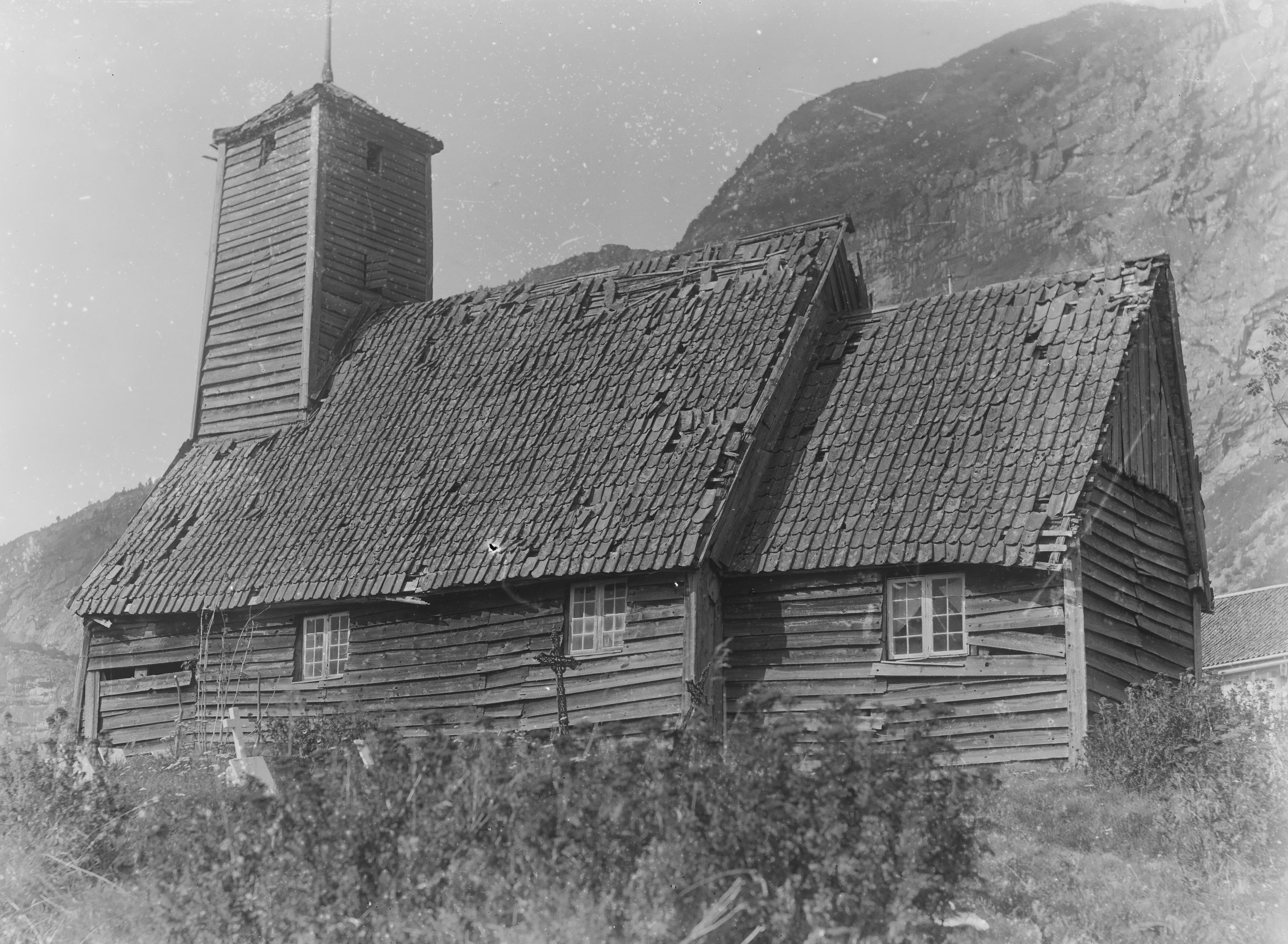 Påskrift negativ: 283 Gaupne [Riksantikvaren] Påskrift konvolutt: A-283 Gaupne kirke. Eksteriør. [Riksantikvaren] Sted: Gaupne Kommune: Luster Fylke: Sogn og Fjordane Tagger: Gaupne gamle kirke eksteriør kirkegård